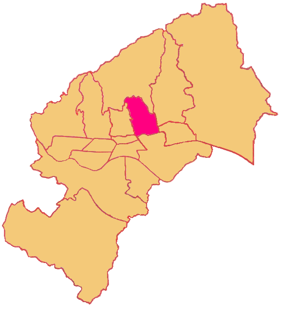 Map of Maksimir District in Zagreb (Gradska četvrt Maksimir)